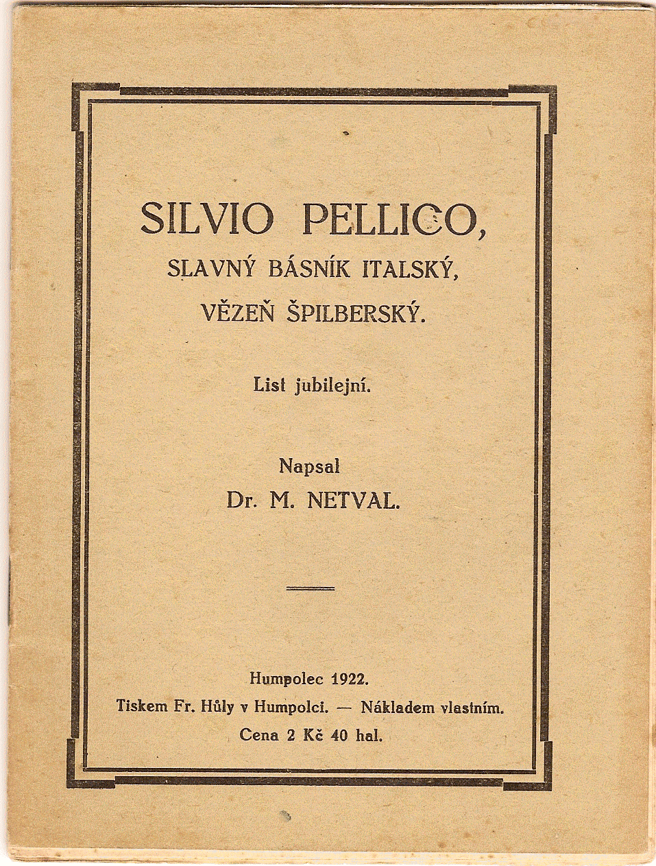 Knížka od Matěje Netvala